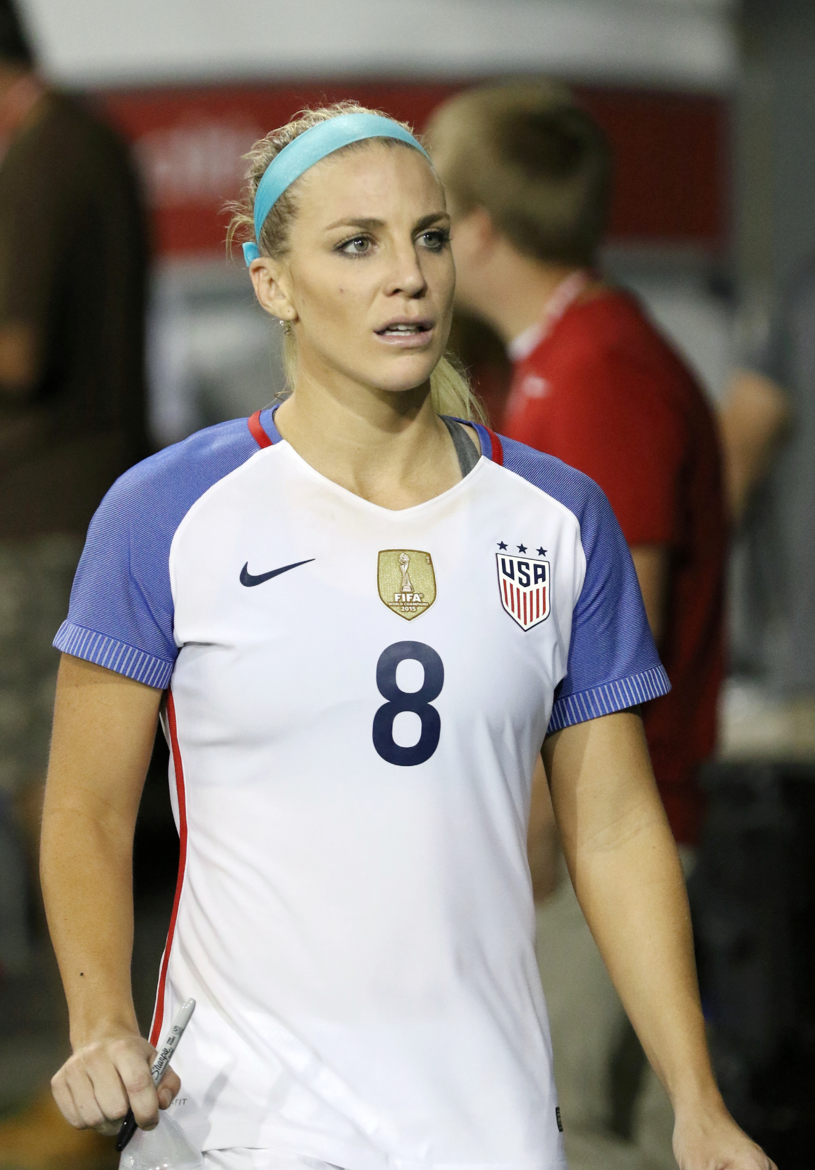 JulieErtz